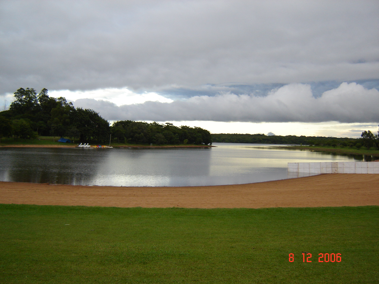 praia nova, santa helena - pra - bRAZIL